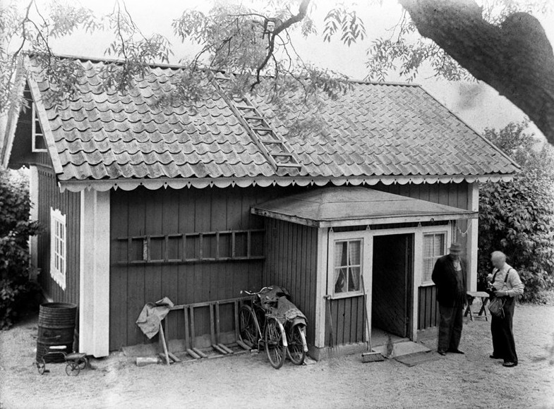 Östberga gård, bostadshus